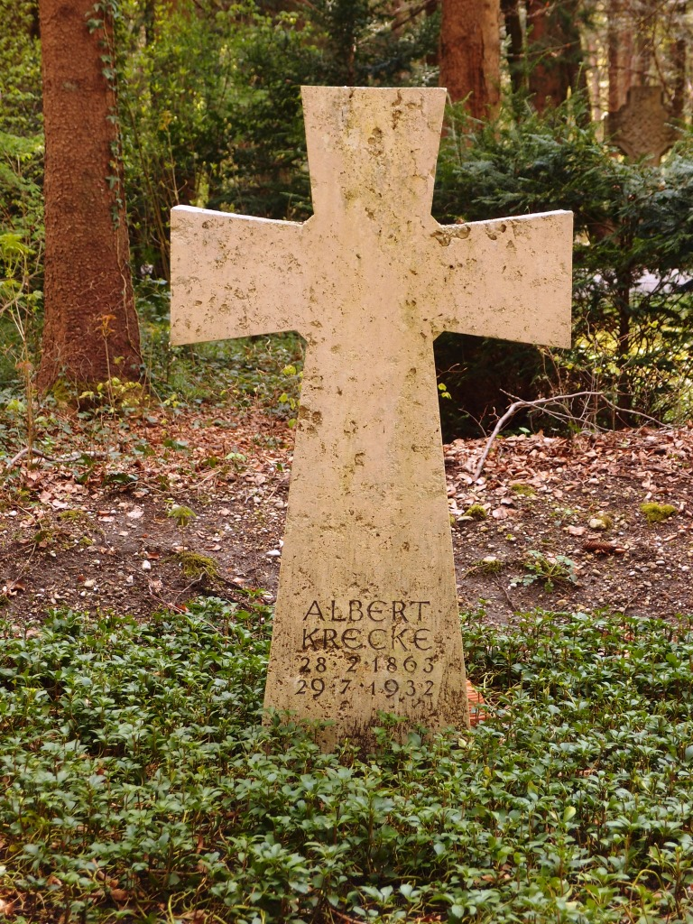 Grab des Chirurgen Albert Krecke (1863-1932) auf dem Waldfriedhof in München.